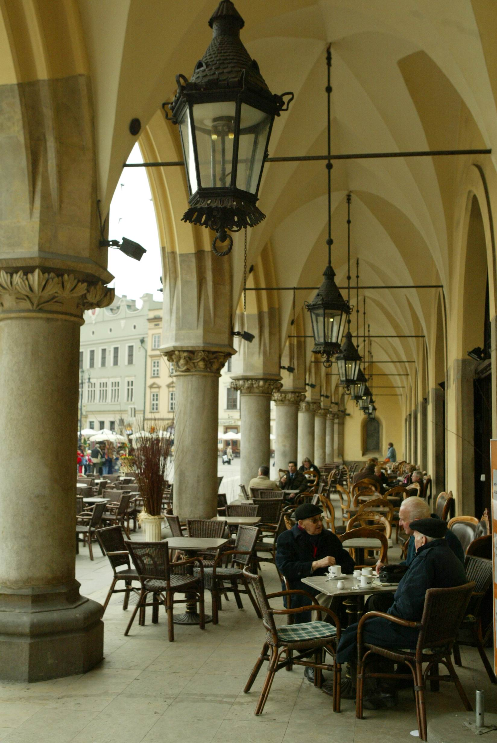 Sukiennice w Krakowie